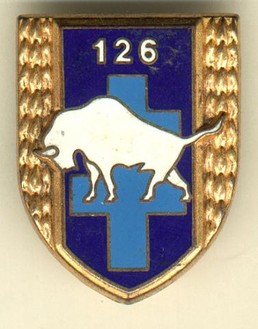 insigne régimentaire du 126e R.I